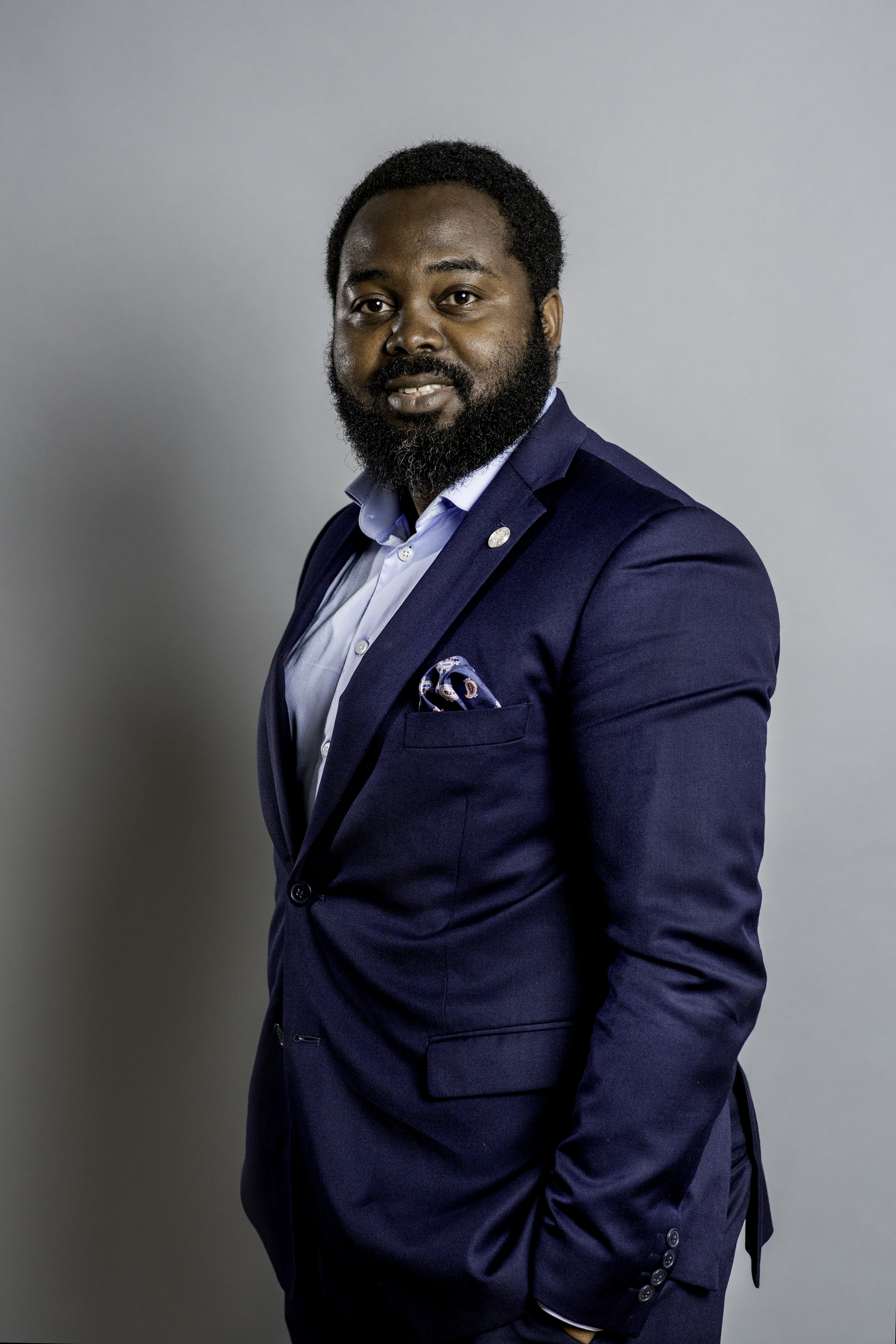 Momodou Jallow. Vänsterpartiet. 2018.